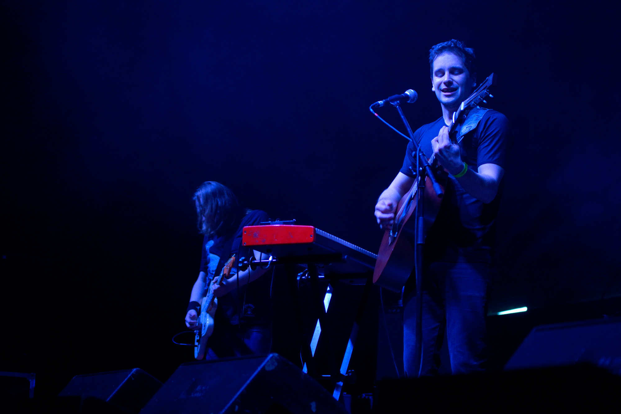 Krzysztof Zalewski z zespołem podczas Rocket Festiwal 2014 w Warszawie.